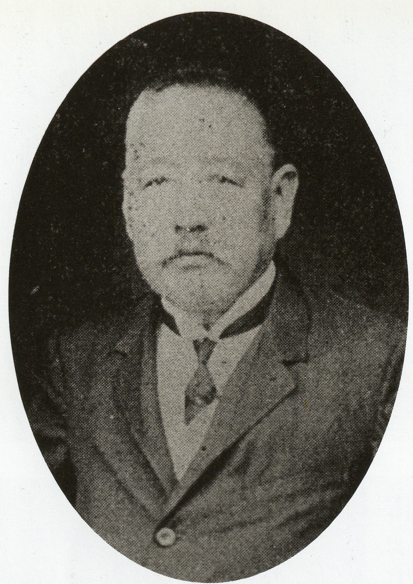 清水宗徳の肖像写真。